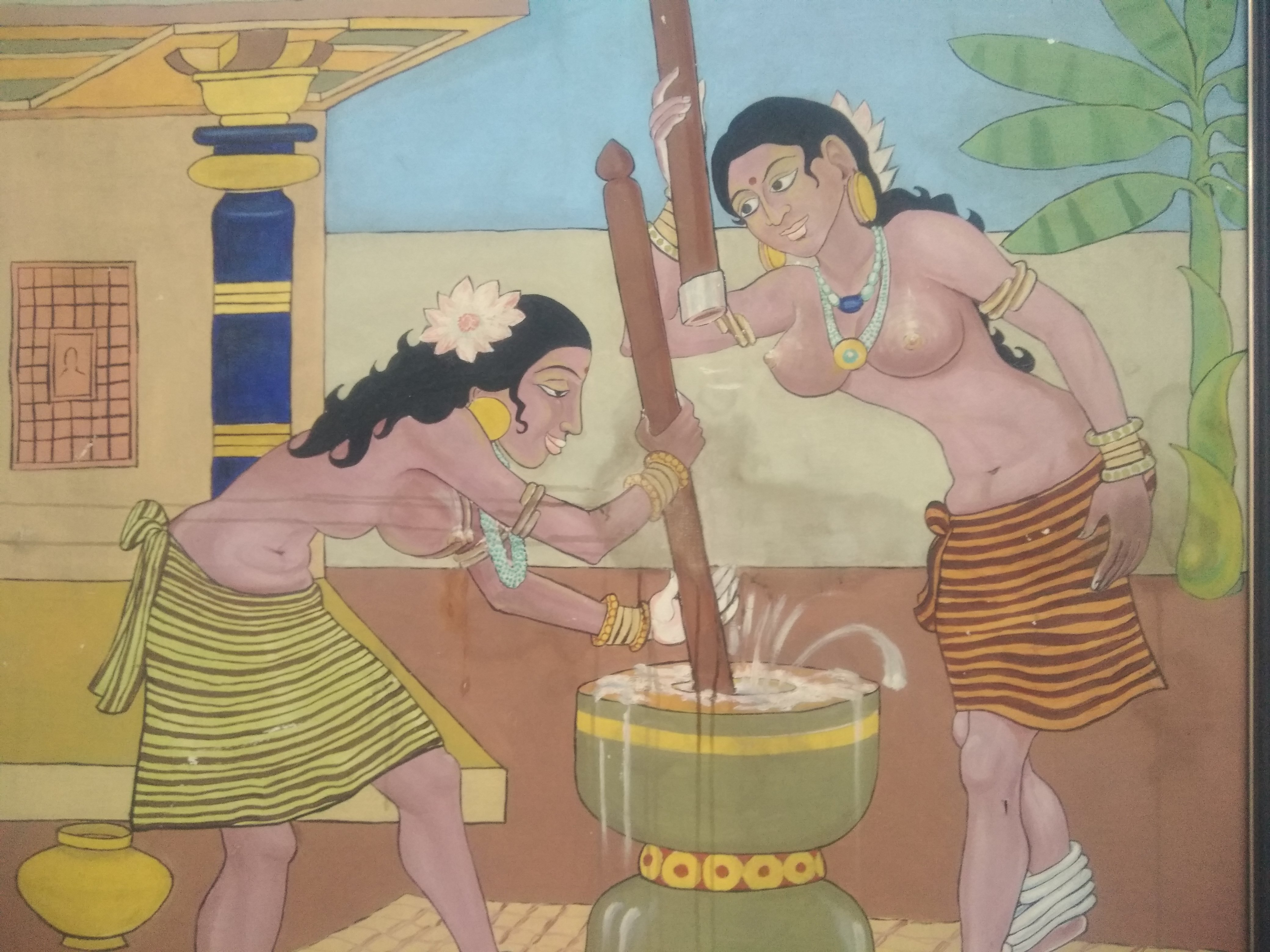 Gadhasapthasati painting: Two young damsels pounding the flour.This is from Gadhasapthasati. గాథాసప్తశతిలో ఇద్దరు యువతులు పిండి దంచుతున్న దృశ్యం. చిత్రకారుడు: కె.యస్ రెడ్డి.